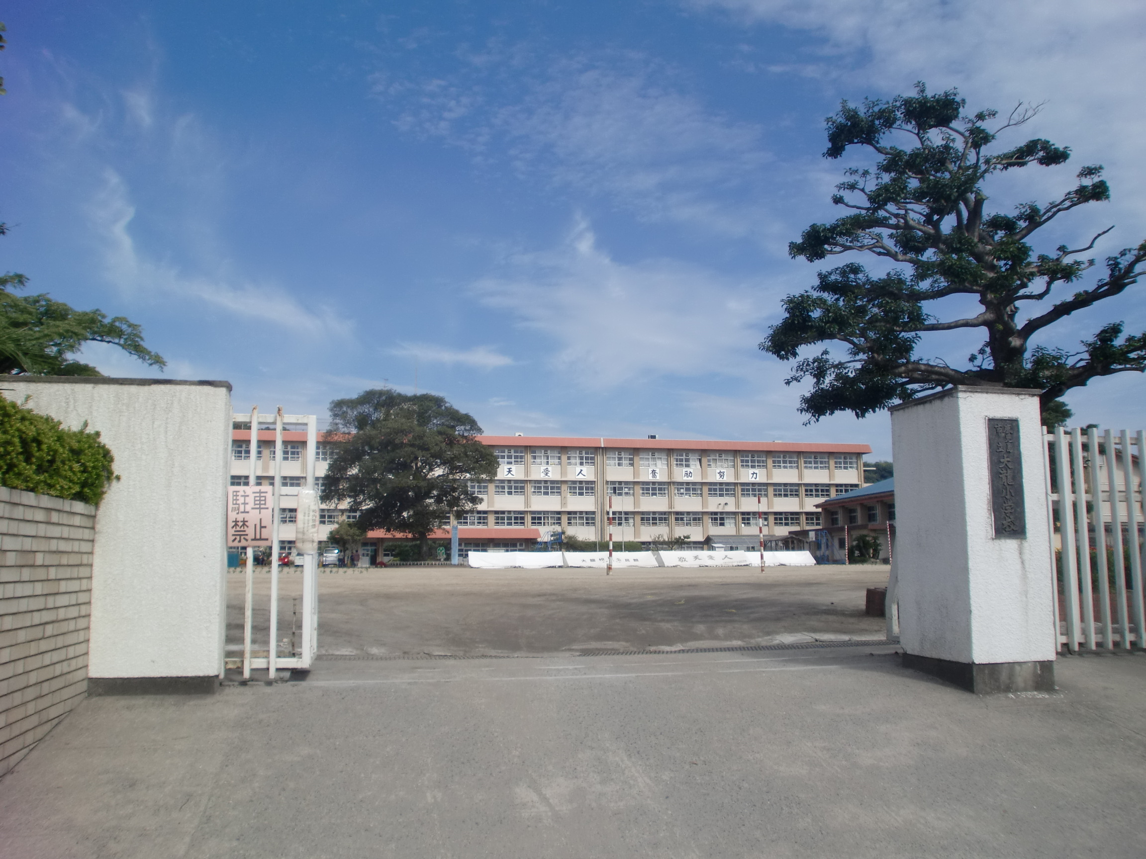 鹿児島市立大龍小学校の外観